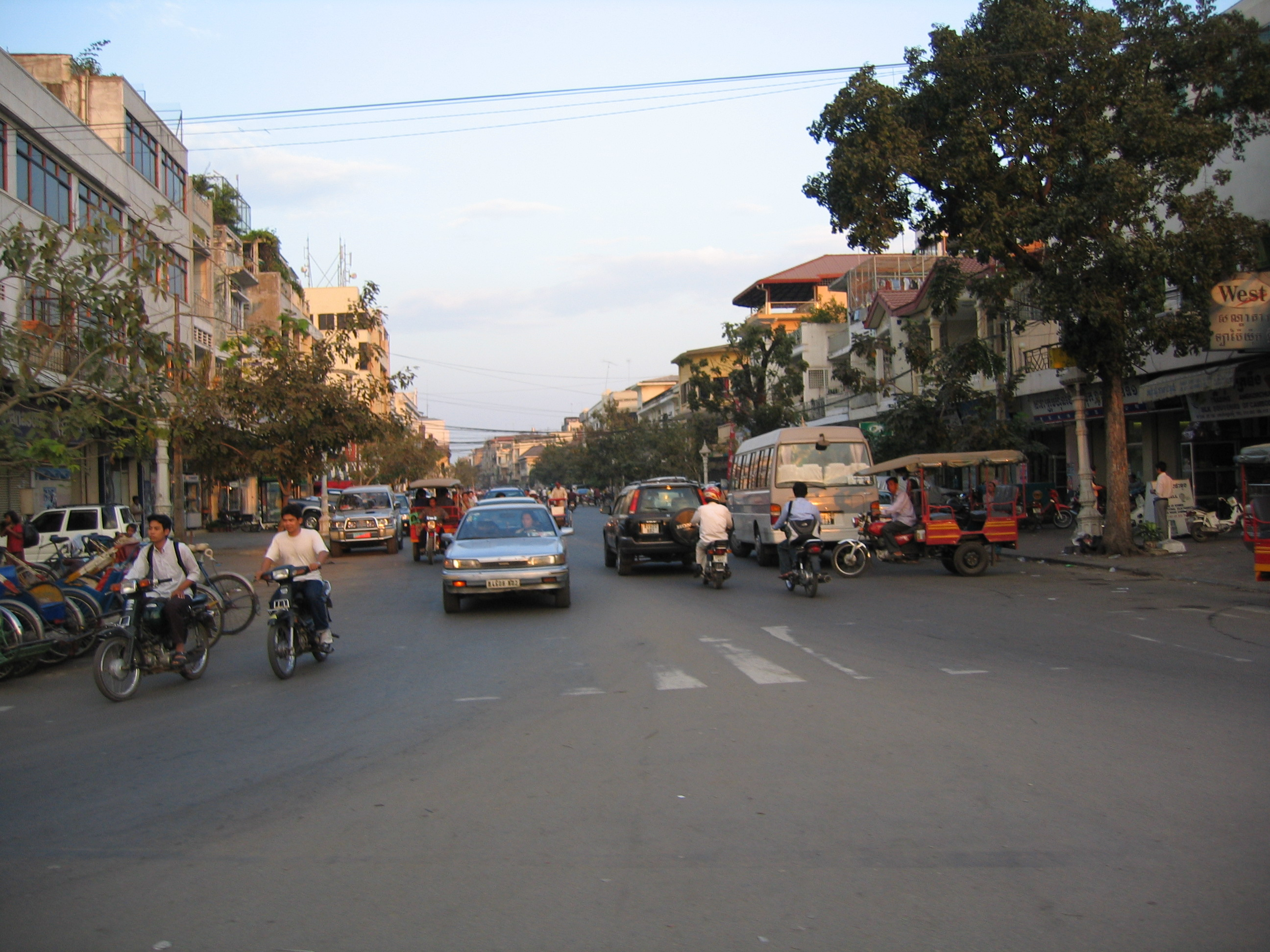 Strassenszene in Phnom Penh eigene Aufnahme